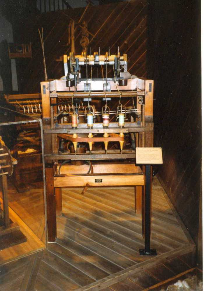 Modell einer Waterframe im historischen Zentrum Wuppertal, eigenes Bild, copyright: GNU FDL